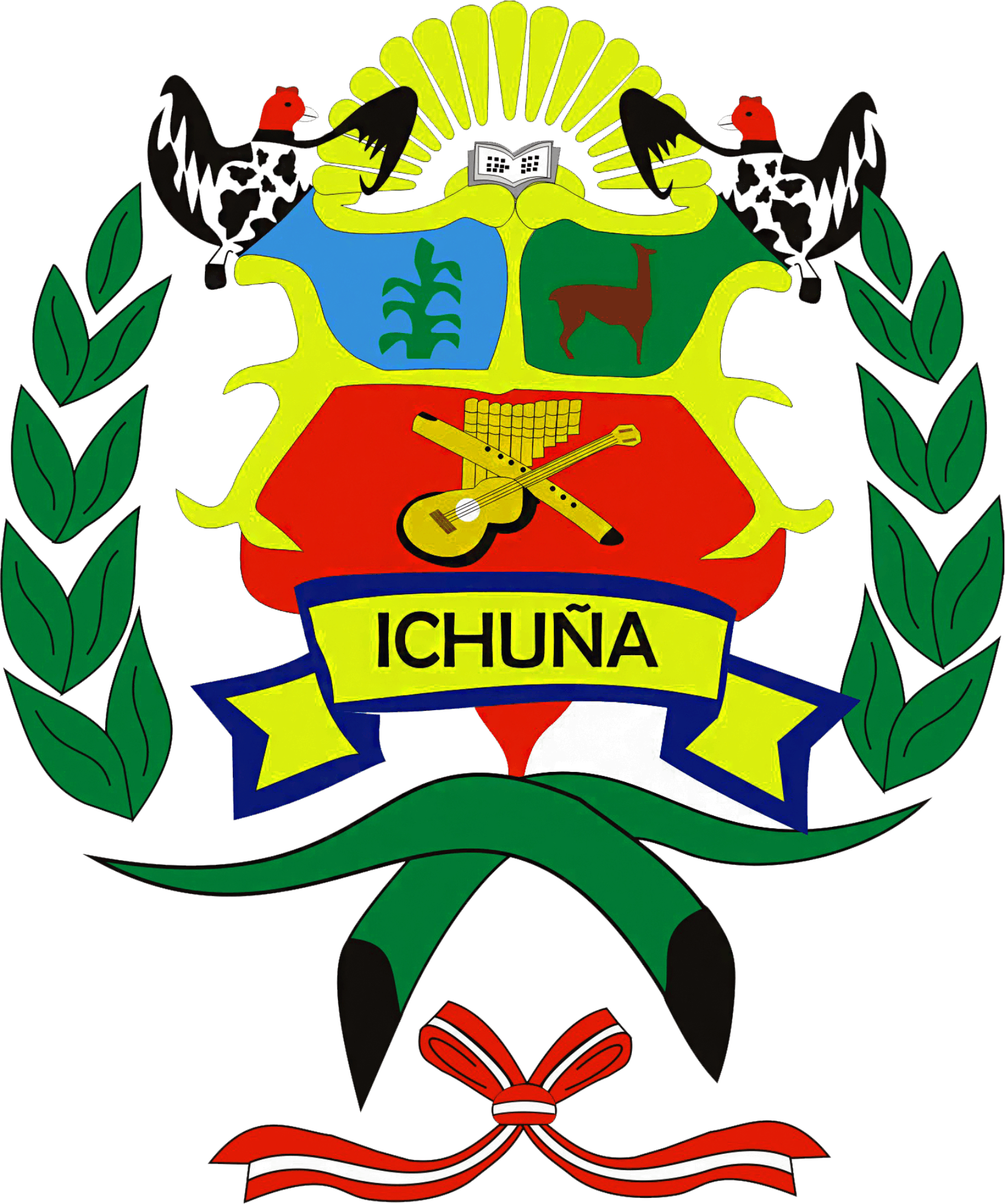 Escudo del Distrito de Ichuña